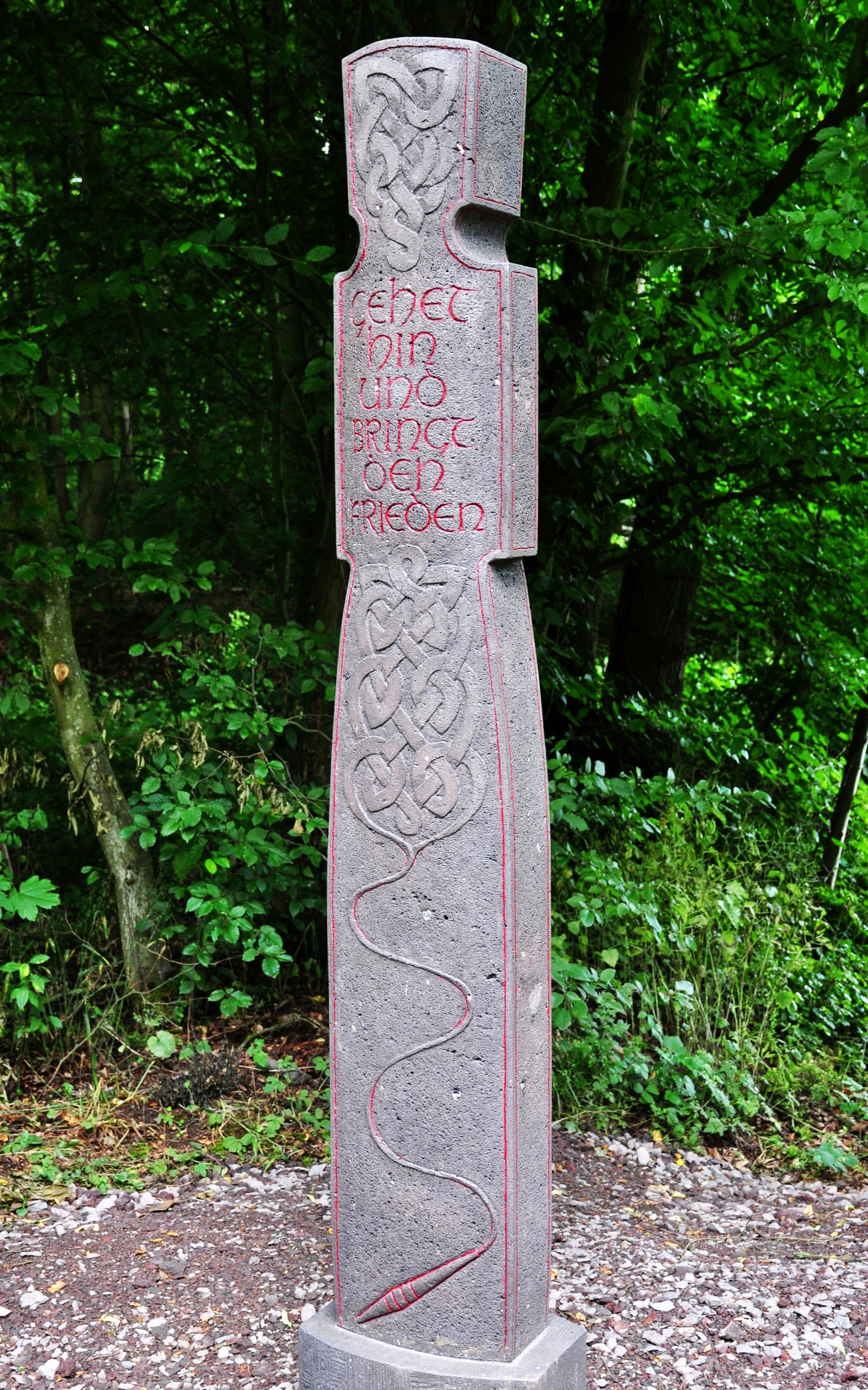 Lüfthildis-Bildstock im Kottenforst nordöstlich des Bahnhofs Kottenforst. Nähere Informationen unter